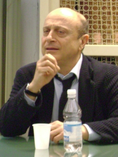 Franco Farinelli, Biblioteca Poletti, Modena